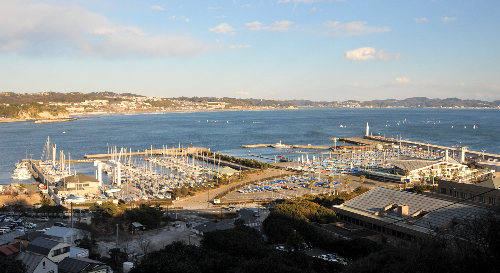 wide view